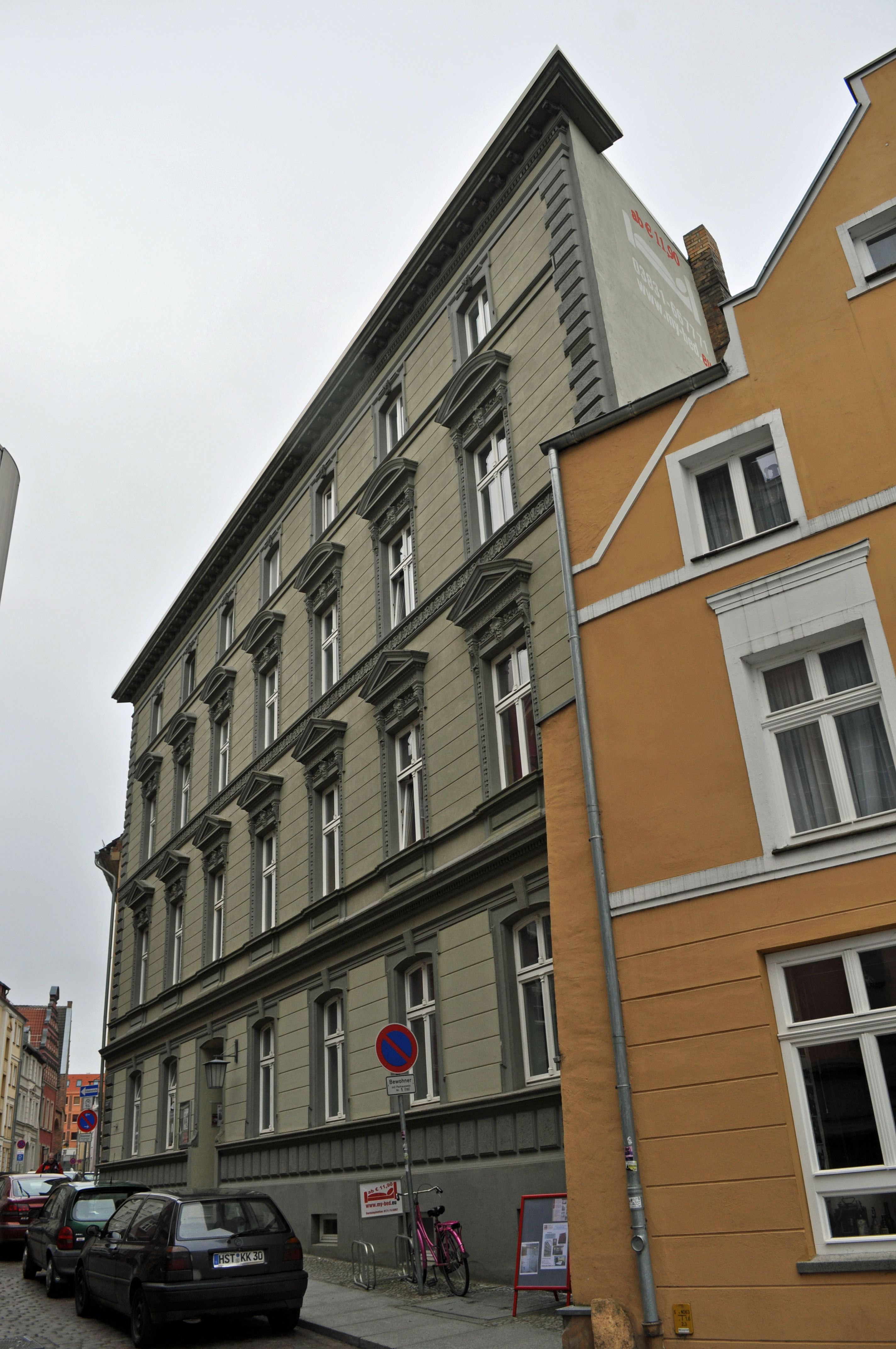 Gebäude bzw. Gebäudedetail in Stralsund. Straße und Hausnummer siehe Dateiname.